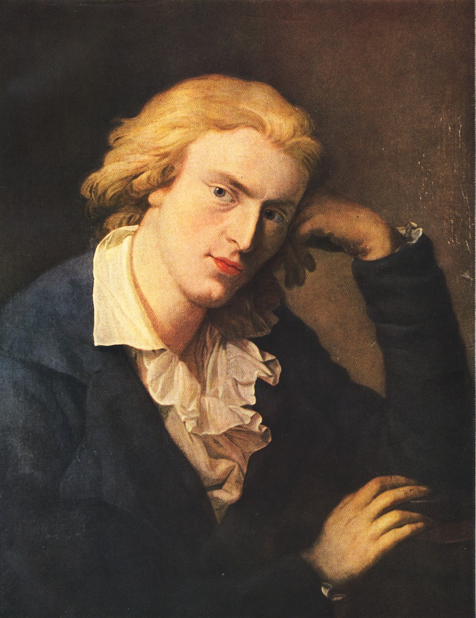 Portrait Friedrich Schiller